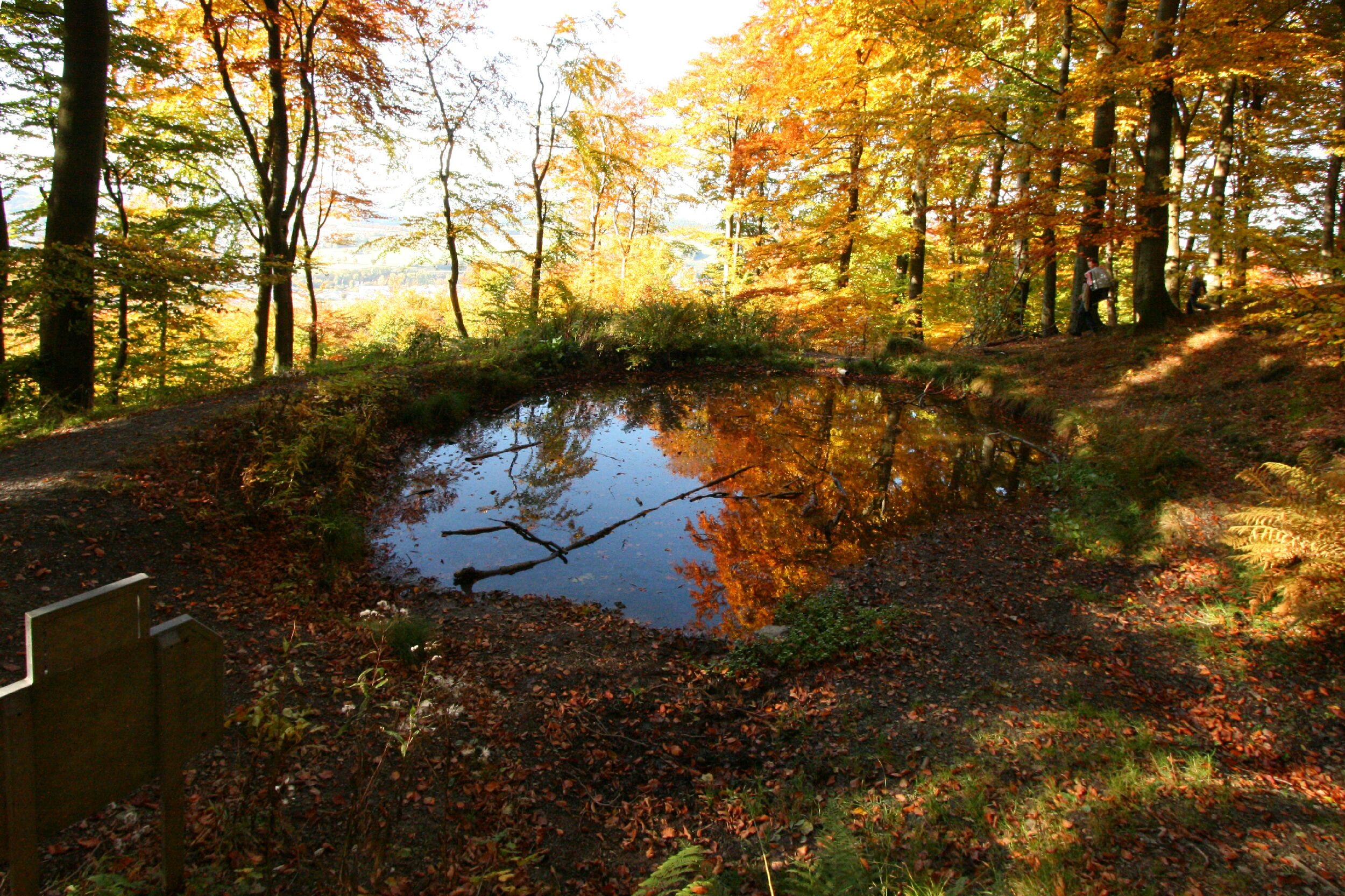 Quelle mit Teich („Brauers-Deyk“ ~Bruder-Teich) im Naturschutzgebiet „Wilzenberg“ am Westhang des Wilzenbergs in Schmallenberg